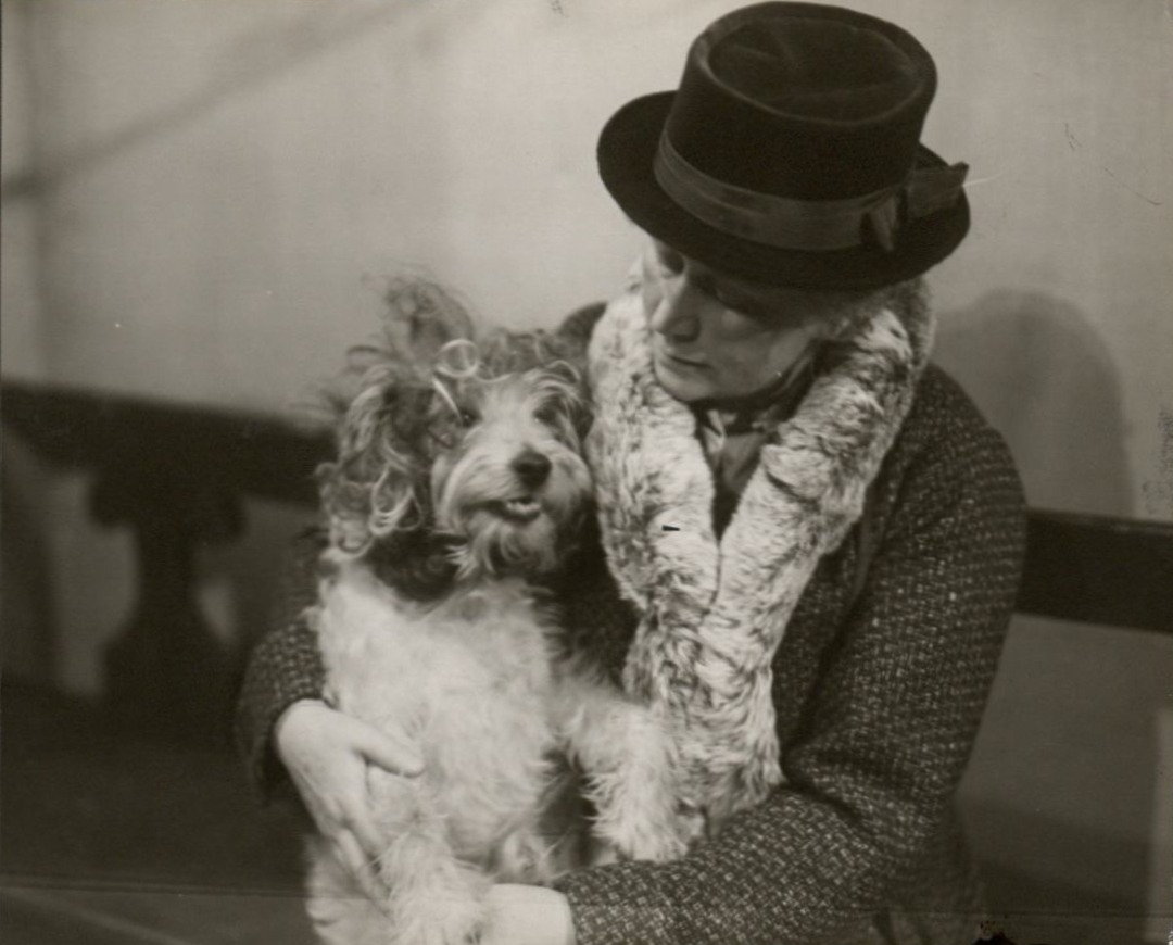 Szenenfoto aus „Sturm im Wasserglas“ von Bruno Frank, Aufführung vom 19. Dezember 1930 im Staatstheater Stuttgart, Emmy Remolt-Jessen als Frau Vogl mit ihrem Hund Toni.